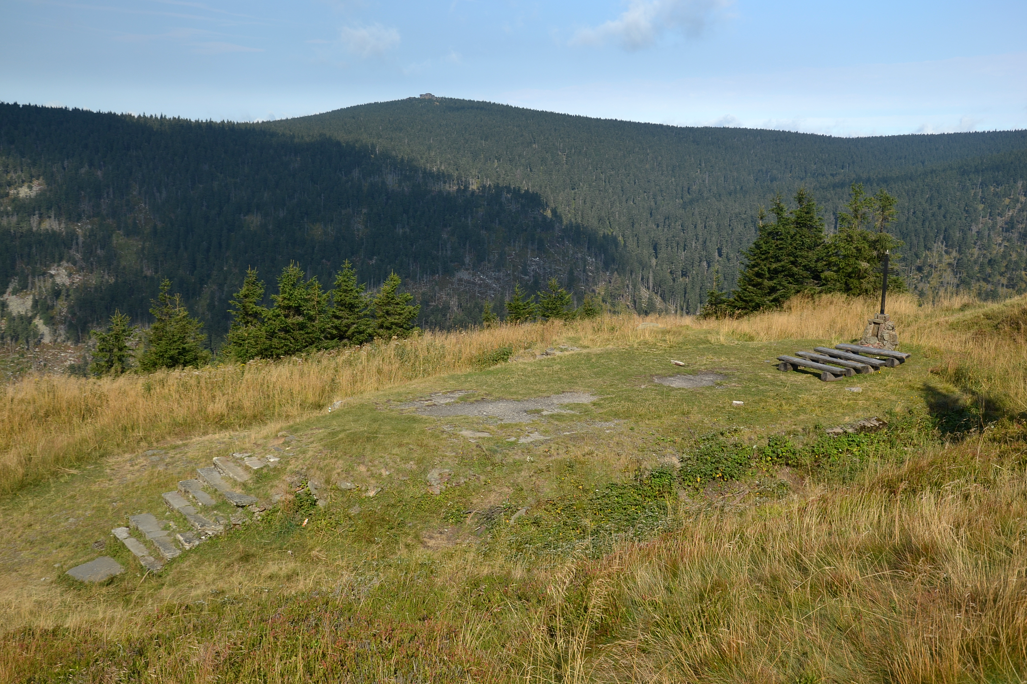 Vřesová studánka (Heidebrünnel), Hrubý Jeseník - místo, kde byl kostel